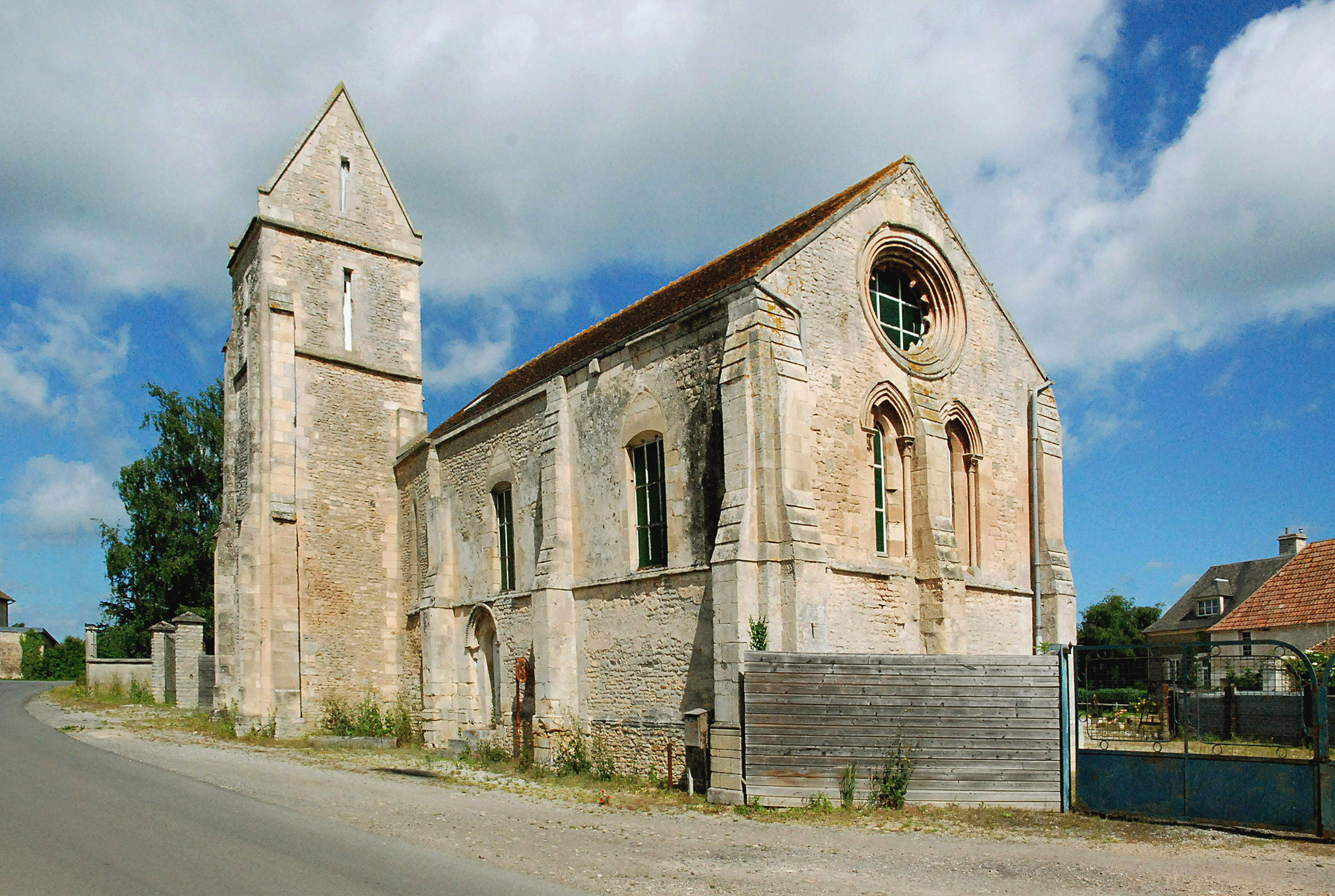 Estrées-la-Campagne (14)